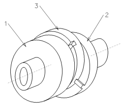 Sprzęgło Oldhama